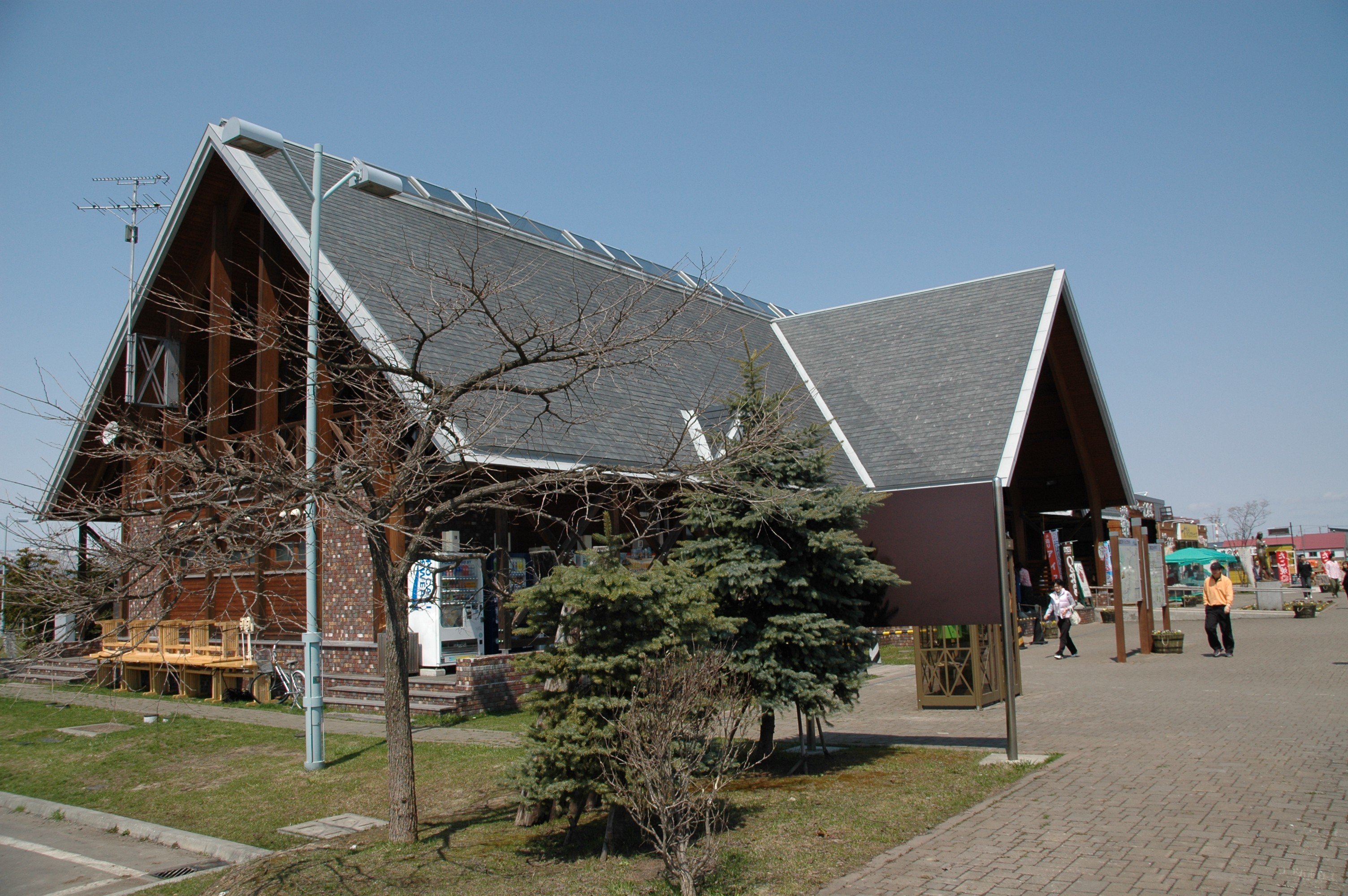 House Yarubi Naie, Michinoeki, Hokkaido, Japan